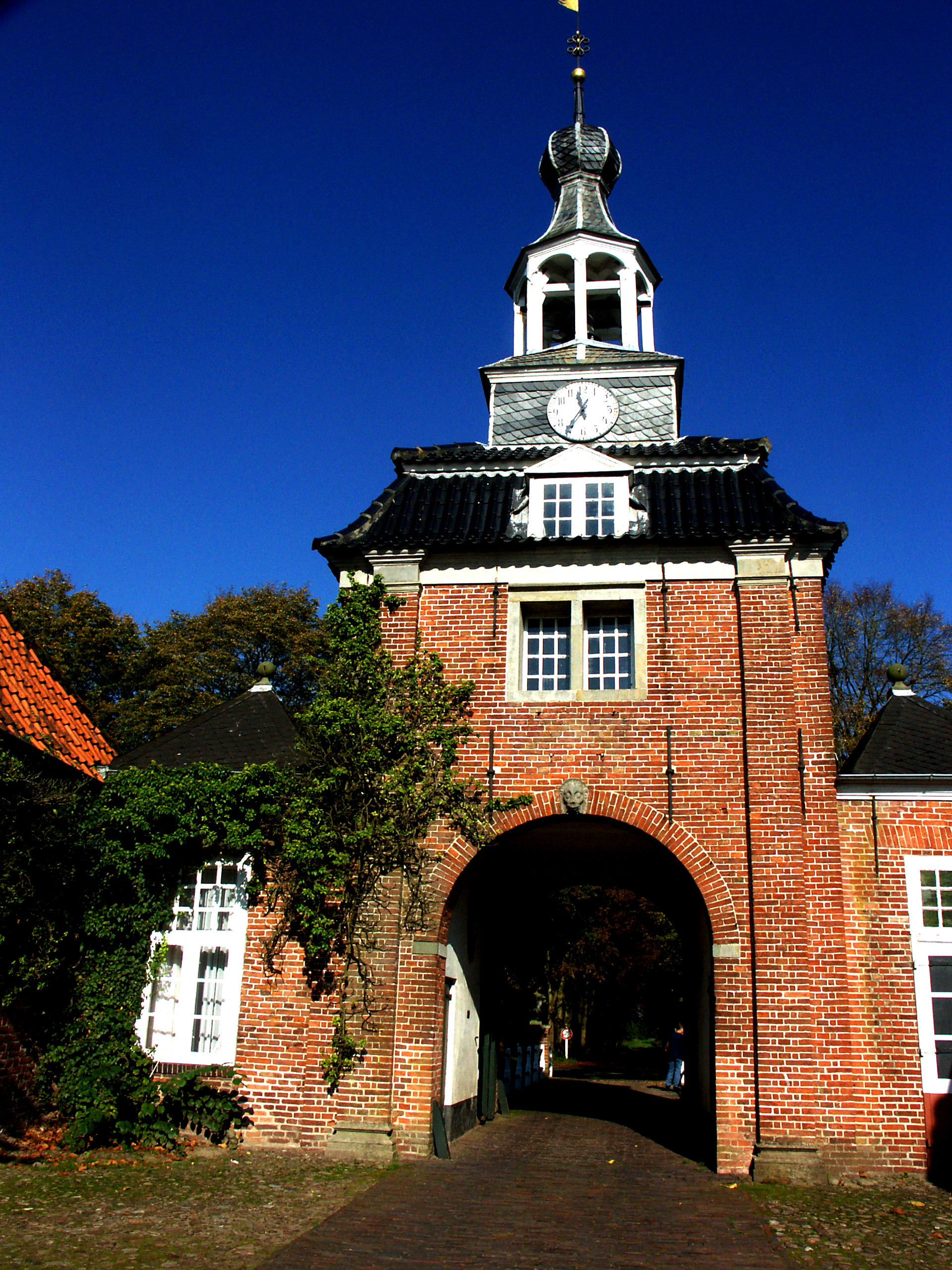 Eingangsportal Lütetsburg /bei Hage (Ostfriesland)